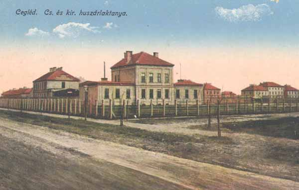 Husarenkaserne in Cegléd